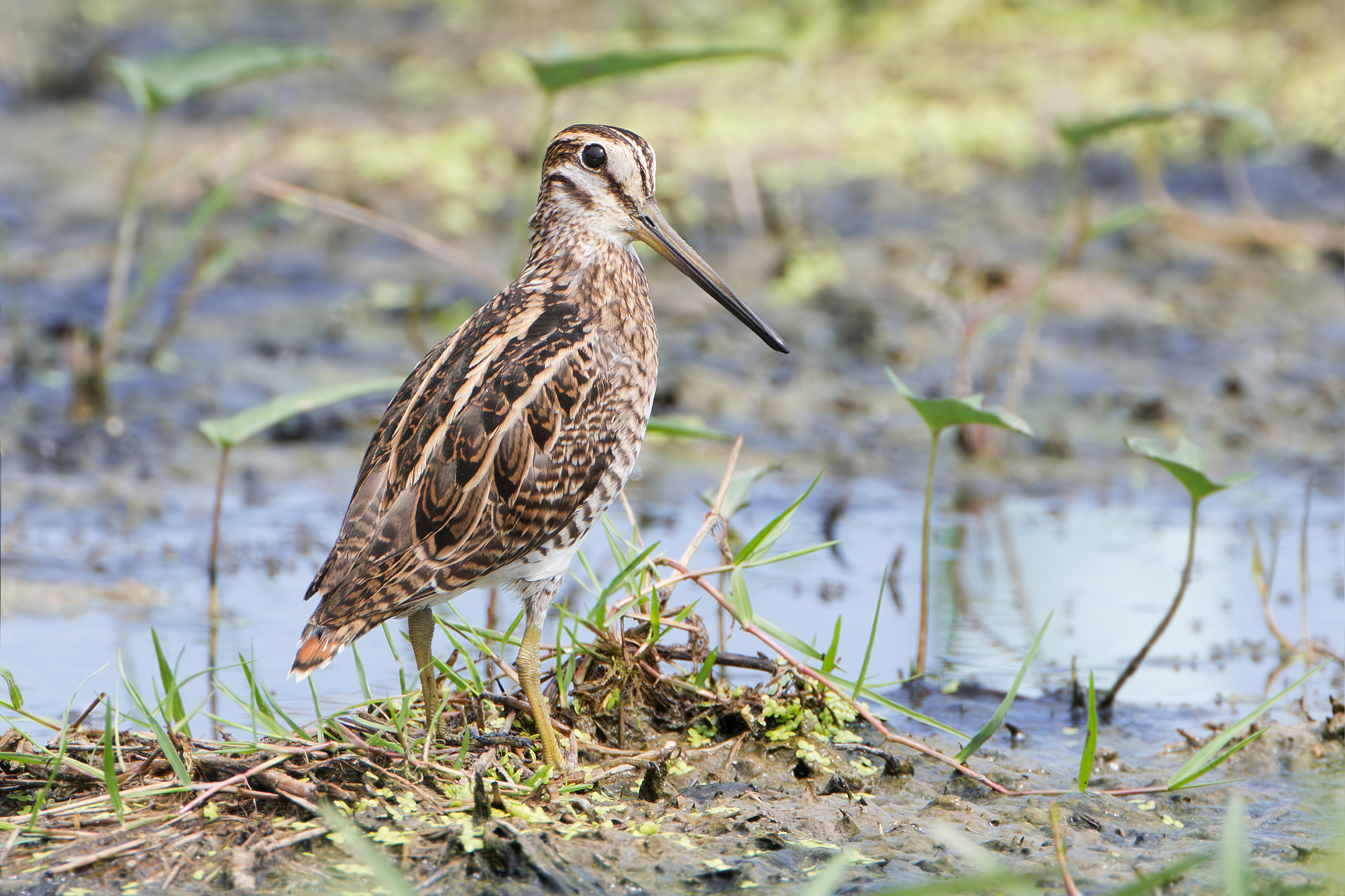 Pin-tailed Snipe (Gallinago stenura), Laem Pak Bia, Petchaburi, Thailand